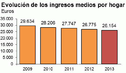 Ingreso medio por hogar en España, tomado de la Encuesta de Condiciones de Vida recopilada por el Instituto Naciona de Estadística